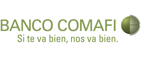 Official Logo Bank Comafi